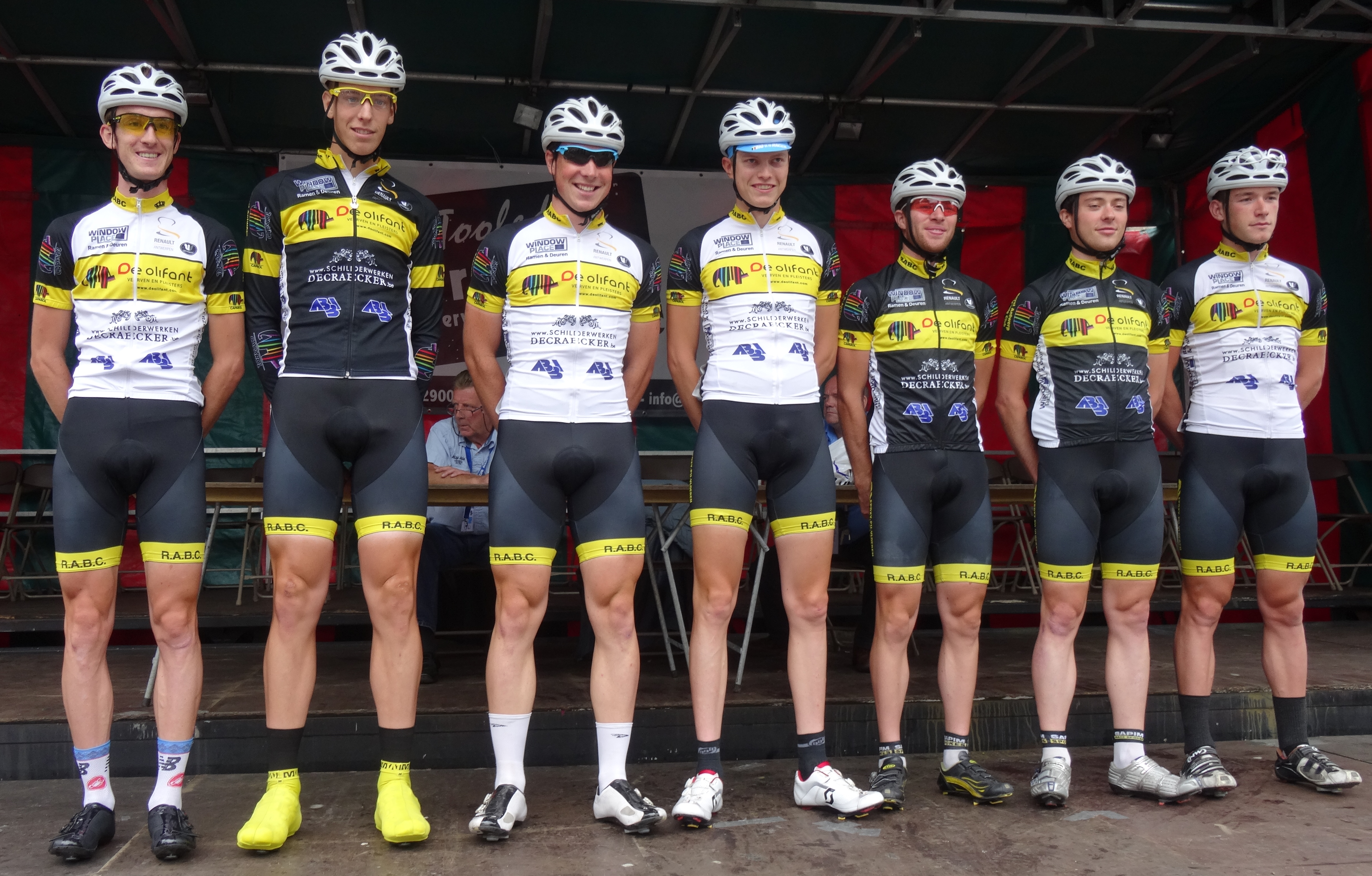 Reportage photographique réalisé le dimanche 10 août à l'occasion du départ et de l'arrivée de la Flèche du port d'Anvers 2014 à Merksem (Anvers), Belgique.